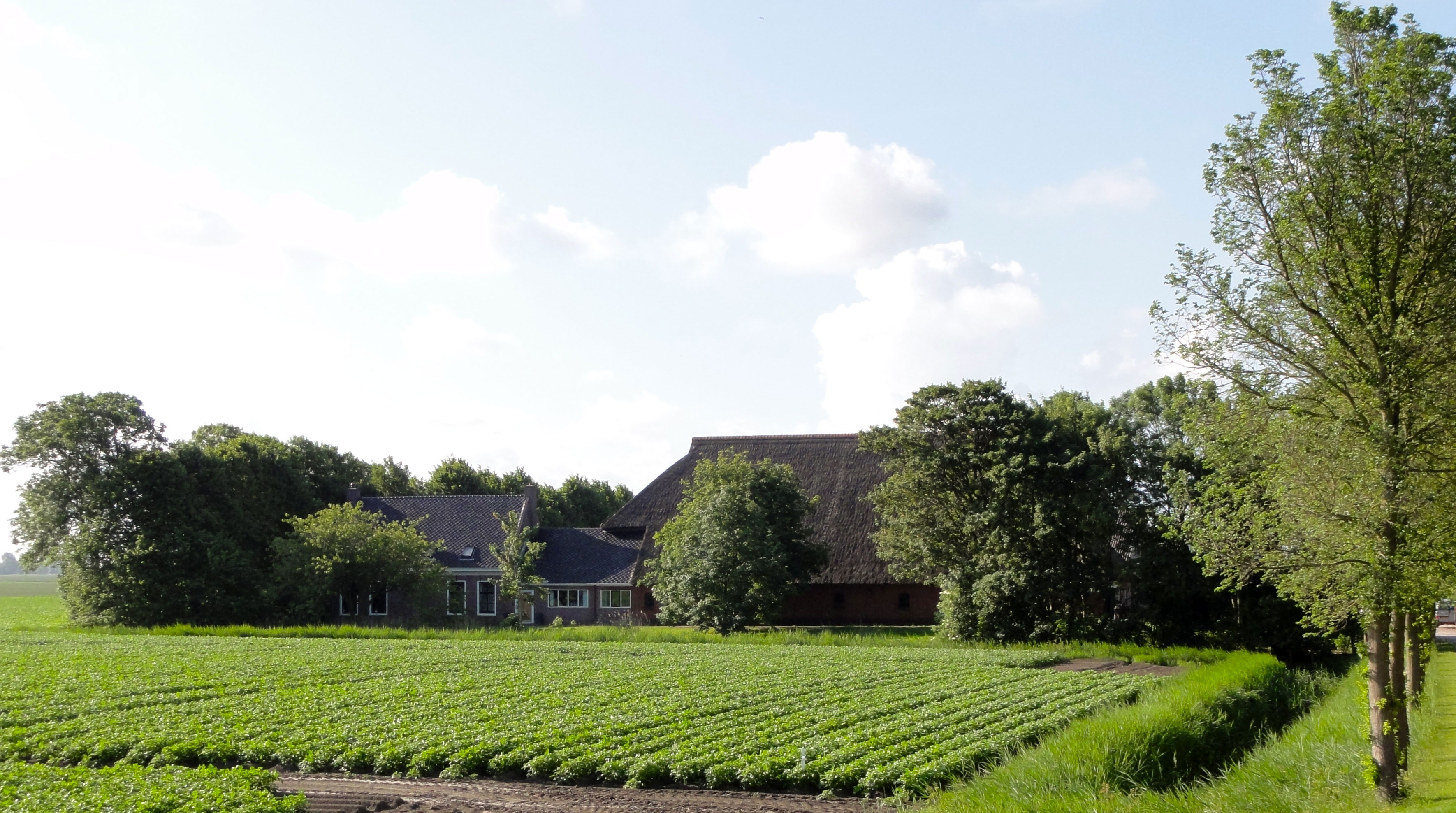 Oudebildtdijk 833 in Sint-Jacobiparochie